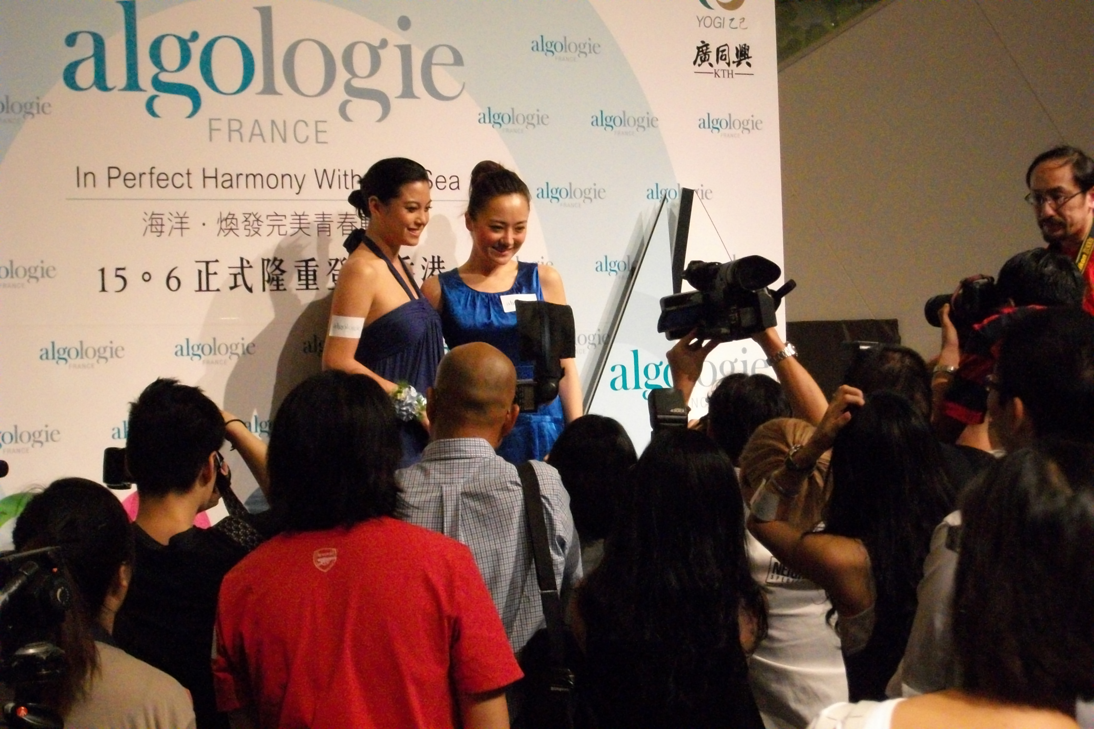 廖碧兒在海港城出席商業活動